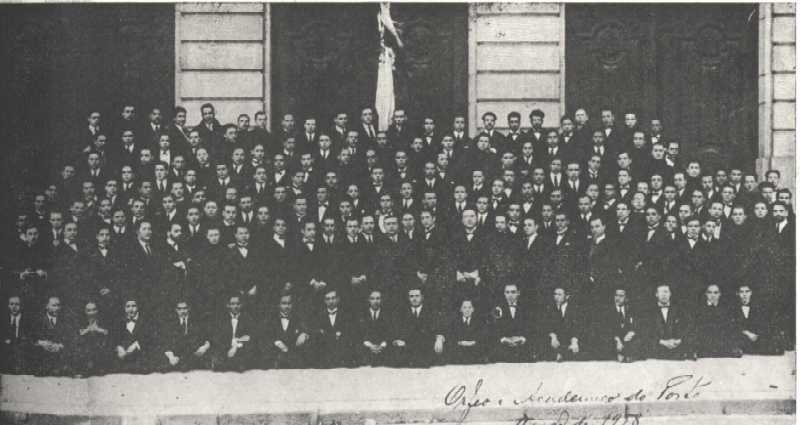 Orfeão Académico do Porto e Tuna Académica do Porto no regresso da Digressão a Barcelona, em 1928.